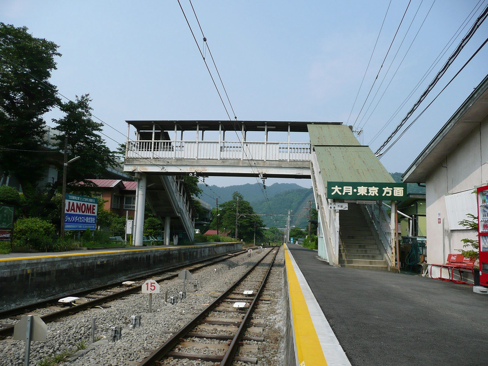 禾生駅ホーム（隣接する踏切より撮影）